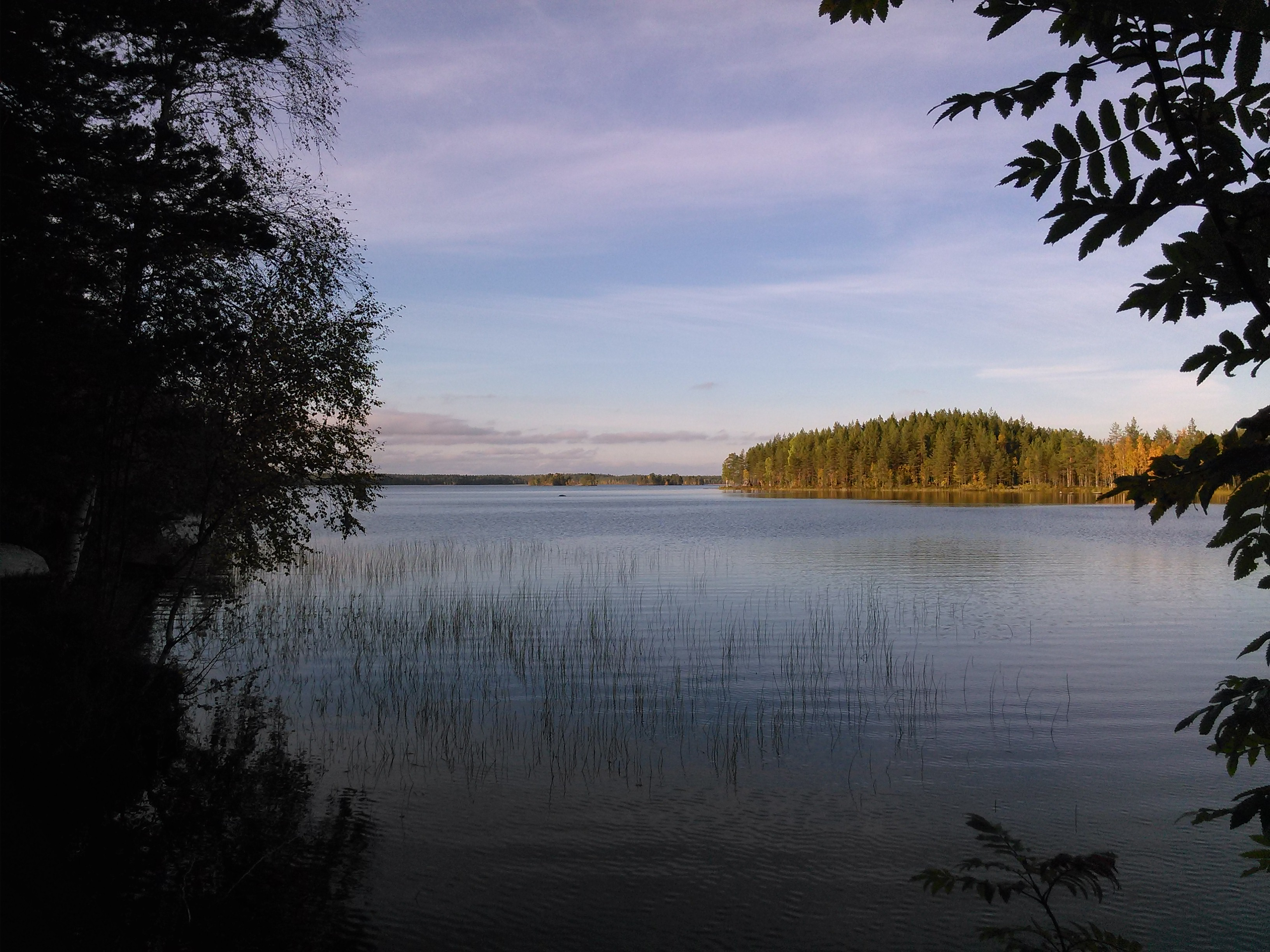 Bäcksjön i Umeå kommun.